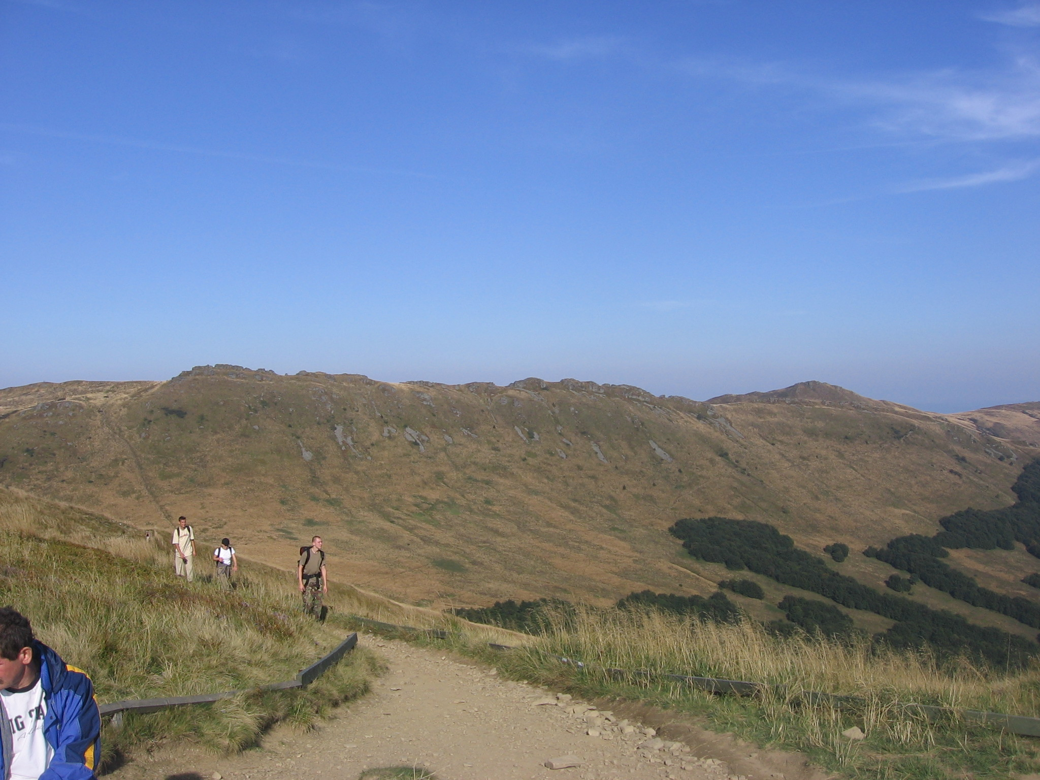 Krzemień peak in Bieszczady mountains - view from the pass under Tarnica. Widok na Krzemień z przełęczy pod Tarnicą.